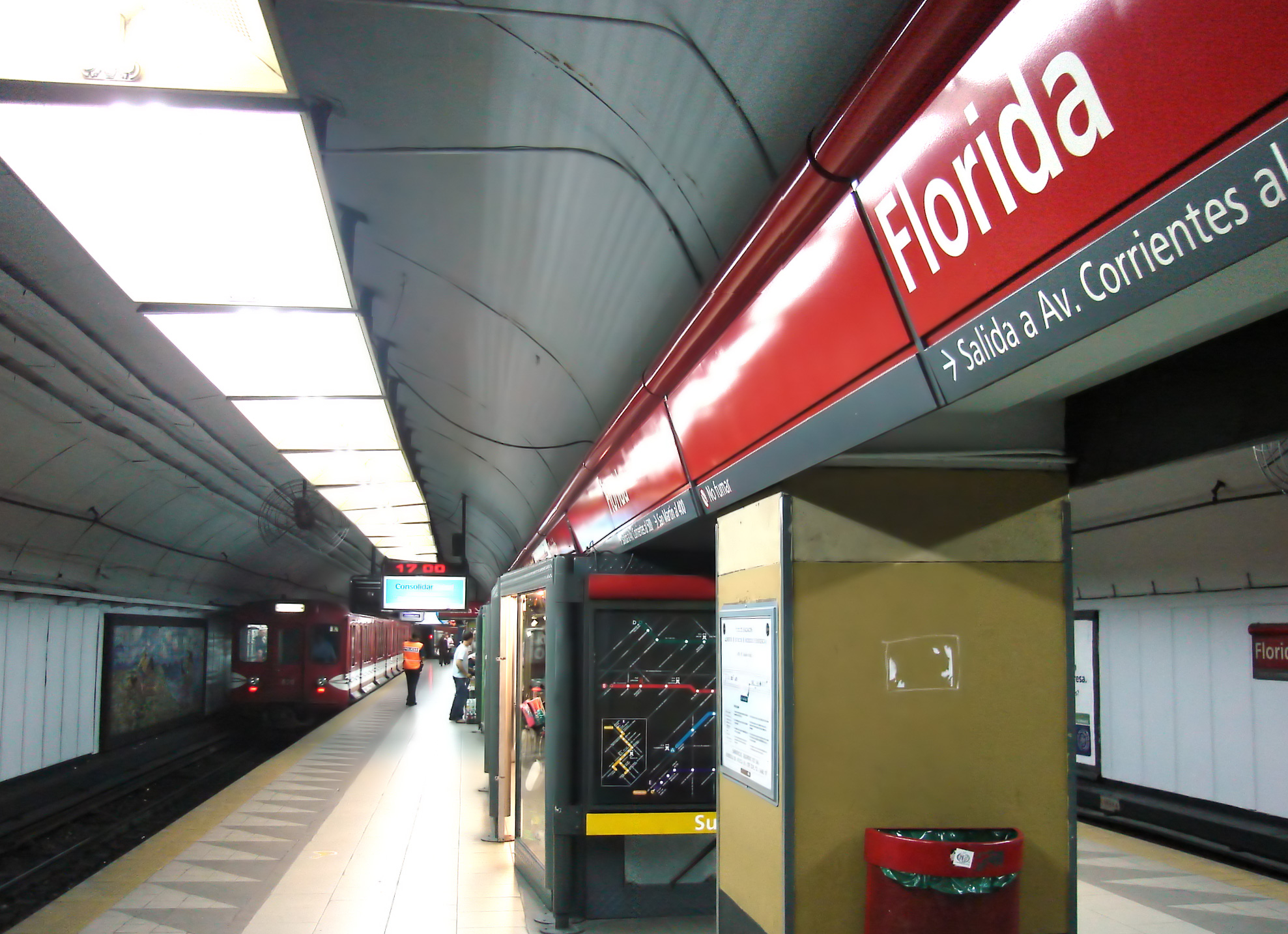 Anden a Los Incas de la estación Florida de la linea B de subtes de Buenos Aires, Argentina.